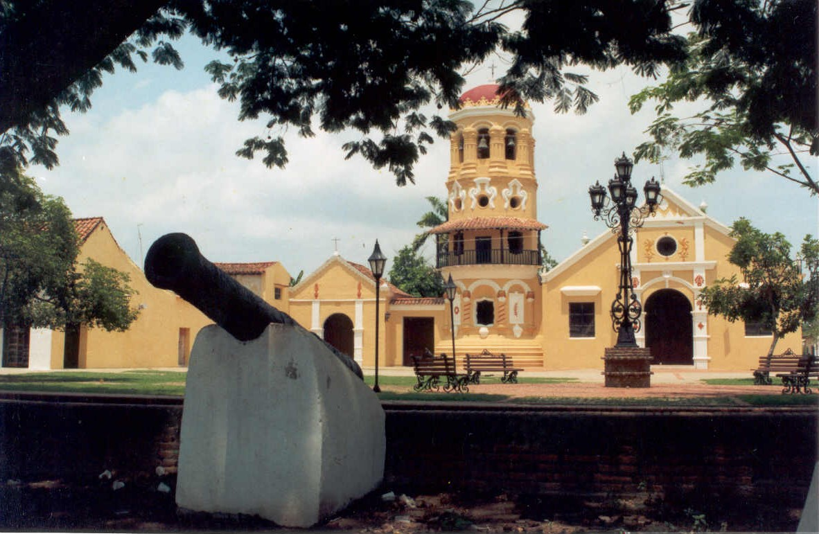 Iglesia de Santa Barbara en Mompox